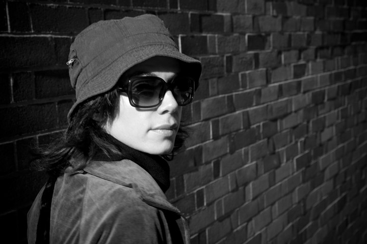 Zazon, réalisatrice et comédienne française, à San Francisco